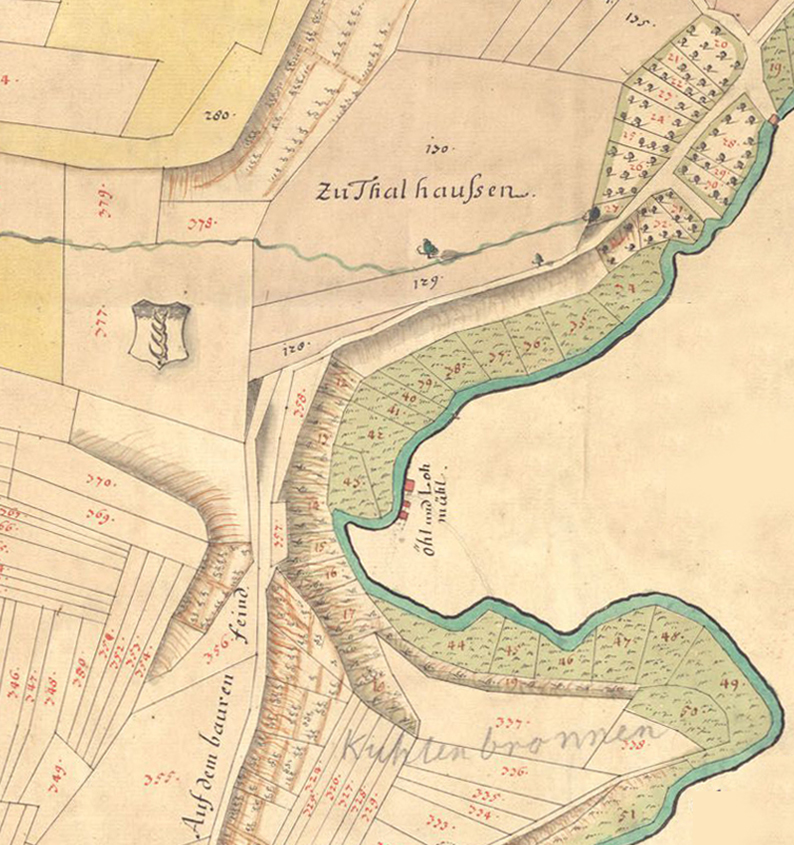 Öl- und Lohmühle (zuvor Pulvermühle, dann Papiermühle) auf der Gröninger Ausfeldkarte von 1751/52 mit Wüstungen Talhausen und Kühlenbronn (Ausschnitt)